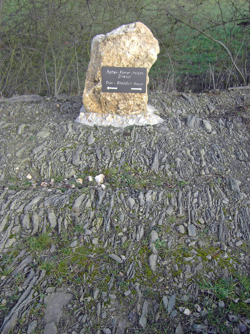 Bild Hinweistafel auf einem Feldstein an der freigelegten Römerstraße/Hessenstraße in der Gemarkung Reichenberg